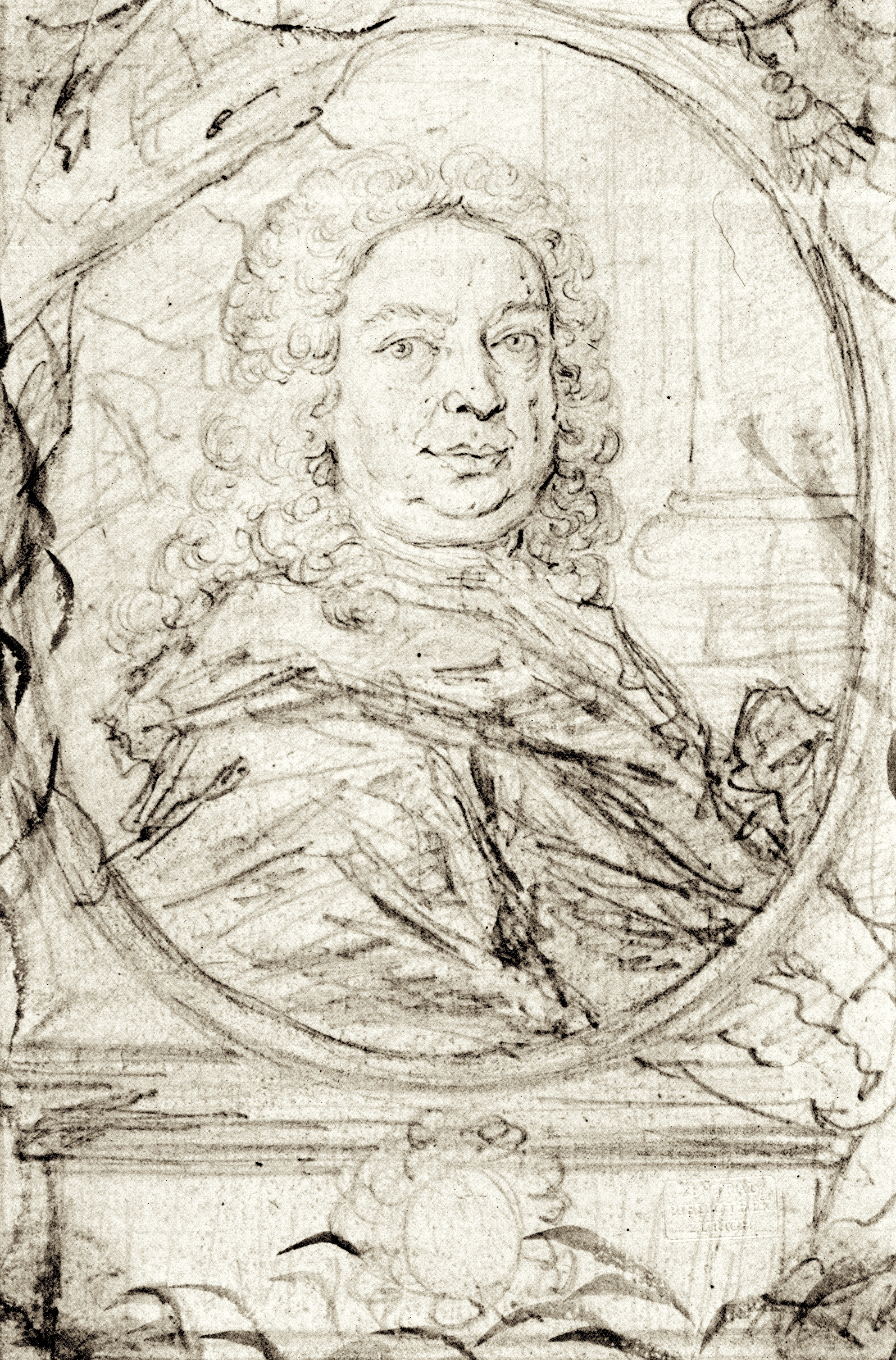 Johann Caspar Ulinger Selbstportrait 1760